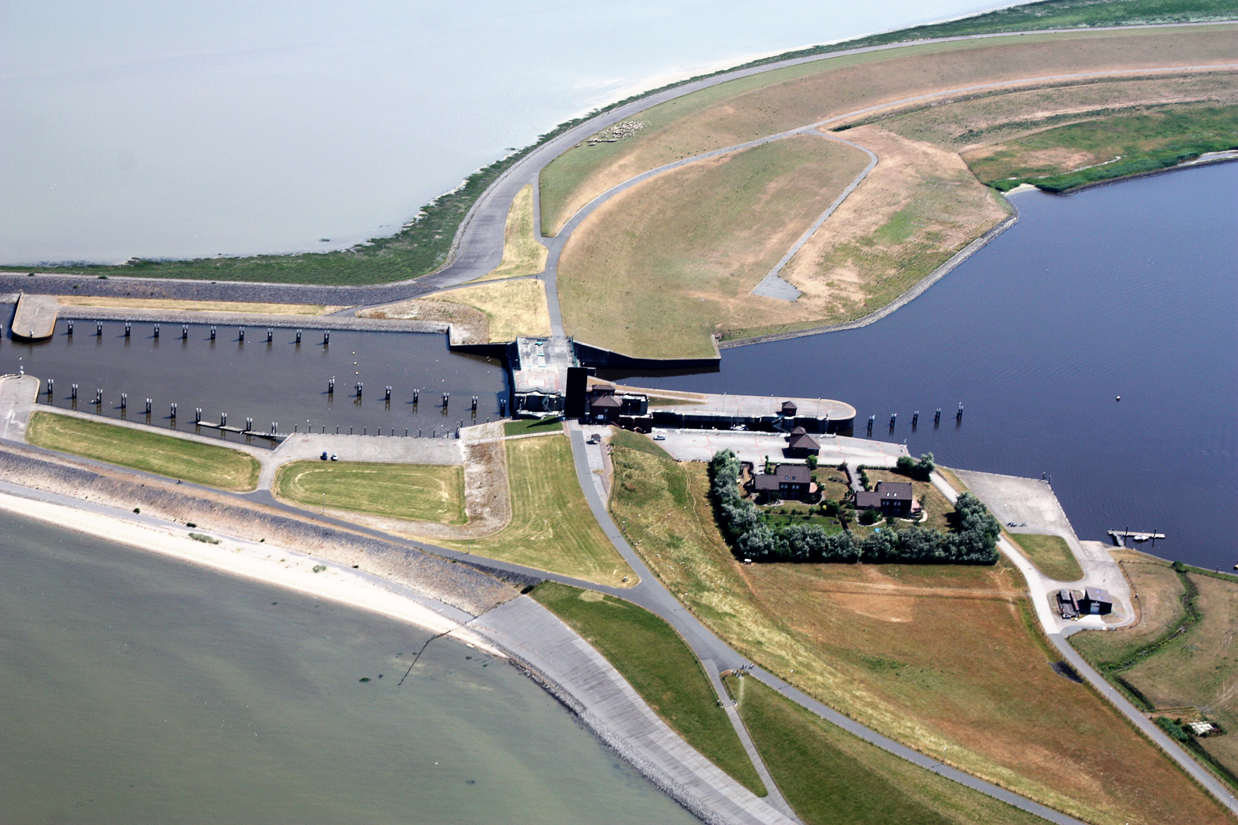 Flug Pilsumer Leuchtturm nach Borkum; Flughöhe 1500 ft; Juli 2010; Originalfoto nachbearbeitet: Tonwertkorrektur und Bild geschärft mit Hochpassfilter